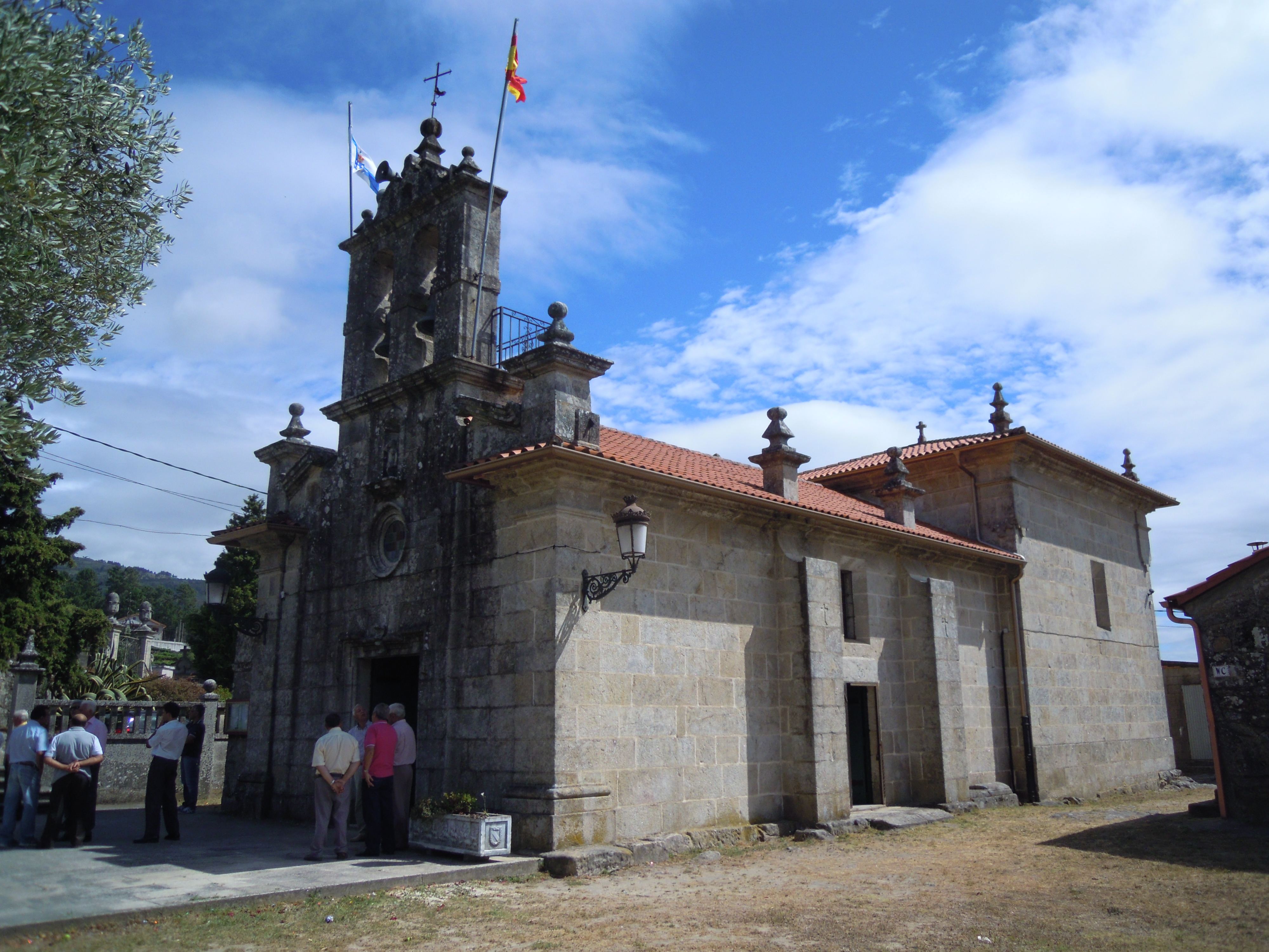 Igrexa parroquial de San Sebastián de Cabeiras (Arbo)